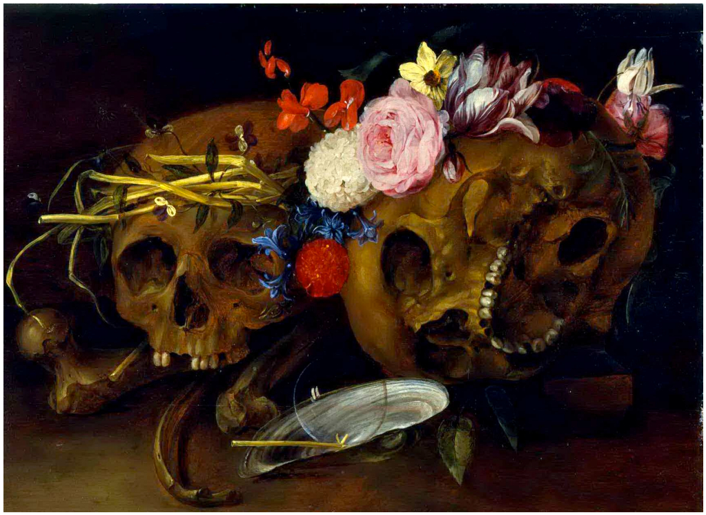 Vanitas